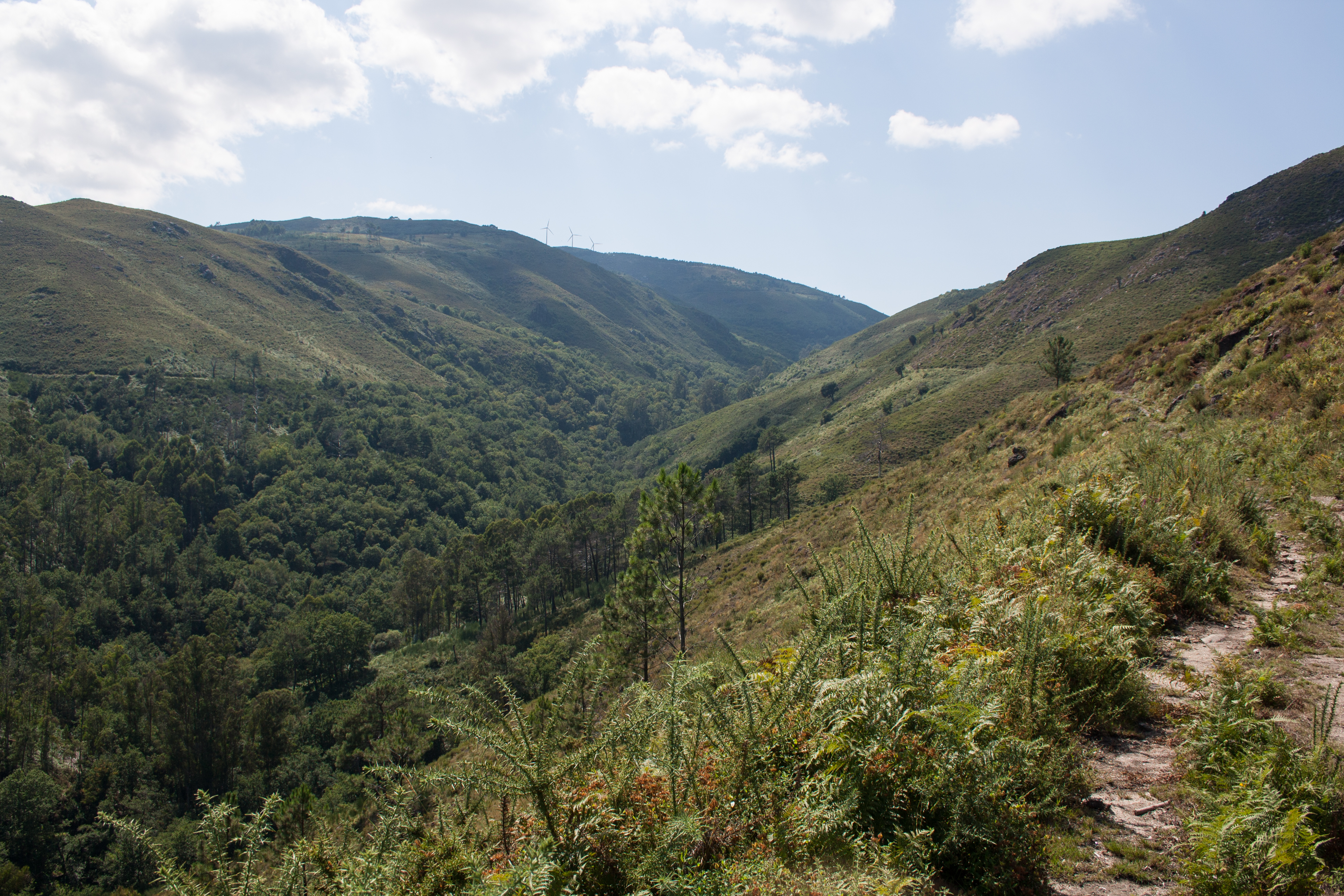 A Cañiza, Pontevedra, Spain